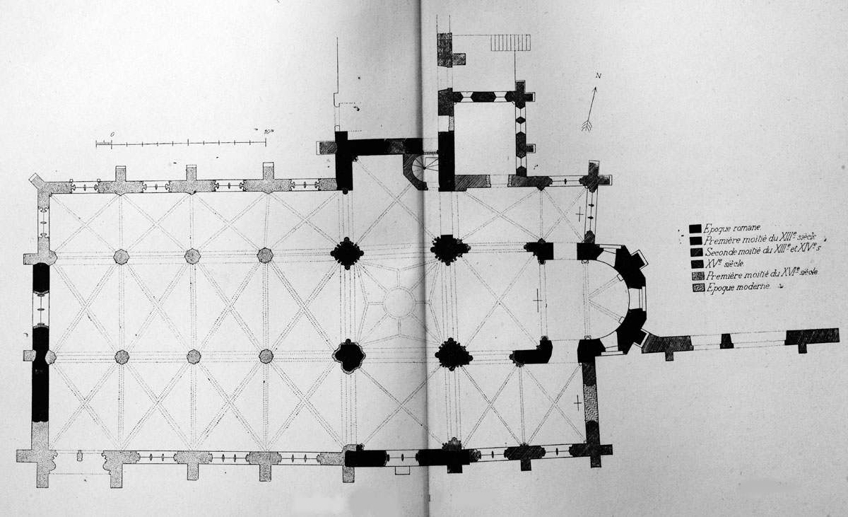 Plan chronologique de l'église.